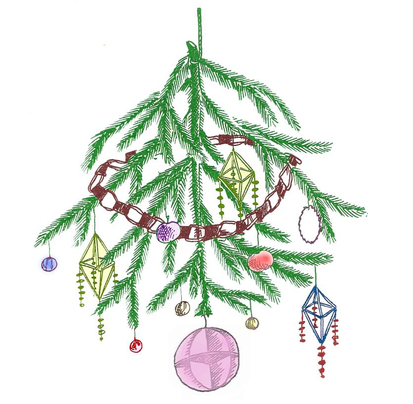 Дерво-полазник. Этнографический музей в Кракове, Польша. 1932